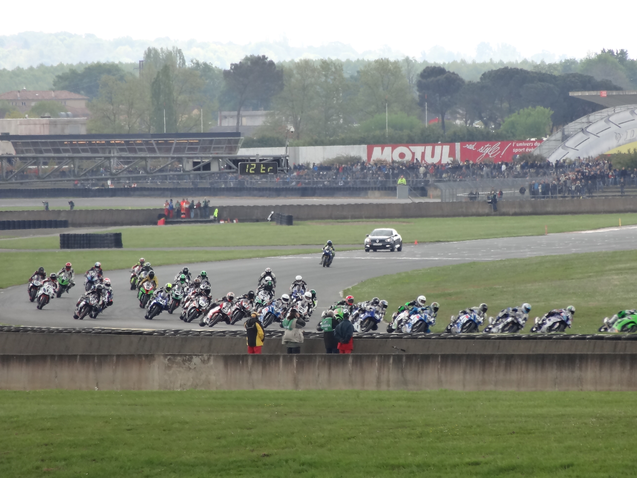 Superbike 2016 Nogaro-54 Circuit Paul Armagnac en avril 2016.